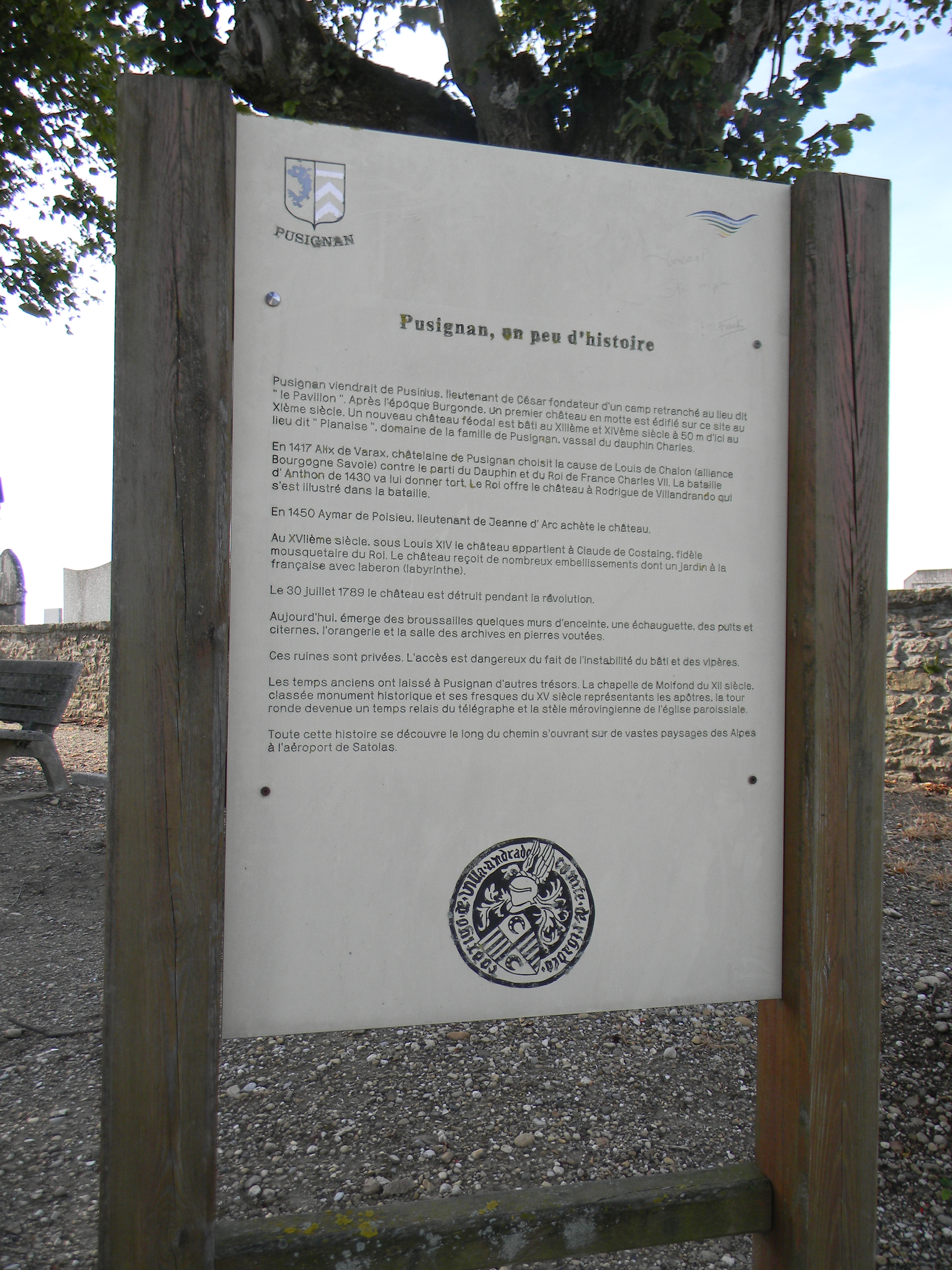 Panneau d'informations sur l'histoire de Pusignan.